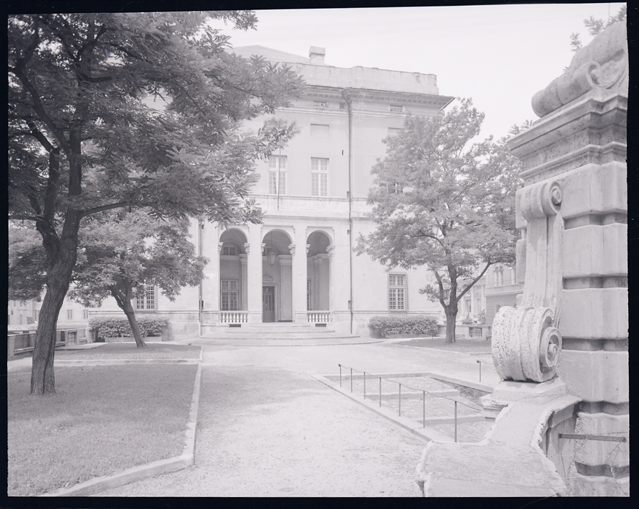 Servizio fotografico : Genova, 1963 / Paolo Monti. - Buste: 6, Fototipi: 6 : Negativo b/n, gelatina bromuro d'argento/ pellicola ; 10x12. - ((Serie costituita da 6 buste sciolte di negativi identificati con i nn.: 6544, 6545, 6546, 6547, 6548, 6549. - Il negativo identificato con il numero 46397 è stato realizzato per Zodiac. - Occasione: Documentazione per la pubblicazione: Italia Nostra (a cura di), "Le ville genovesi", catalogo della mostra, Genova 1962, Genova, Comune di Genova, 1967. - Fonte: Monografia di Italia Nostra (a cura di): Le ville genovesi, catalogo della mostra, Genova 1962, Genova, Comune di Genova (1967). - Fonte: Lettera di Paolo Monti: I. Carteggi/ Genova - Enrico (1963-1966), presso Archivio Paolo Monti. Camicia con documenti dattiloscritti e manoscritti vari relativi al lavoro eseguito per Italia Nostra: preventivi, lettere, inventari. - Fonte: Rubrica di Paolo Monti: Archivio fino 1-4-1961/ 31-3-1963 (1961-1963), presso Archivio Paolo Monti. - Fonte: Agenda di Paolo Monti: R 1 - Monti/ 1 aprile 1963 - 6 giugno 1964/ 6000-8193 (1963-1964), presso Archivio Paolo Monti